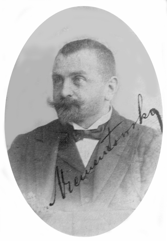 Stefan Niementowski - chemik, profesor Politechniki Lwowskiej, członek Polskiej Akademii Umiejętności. Fotografia portretowa